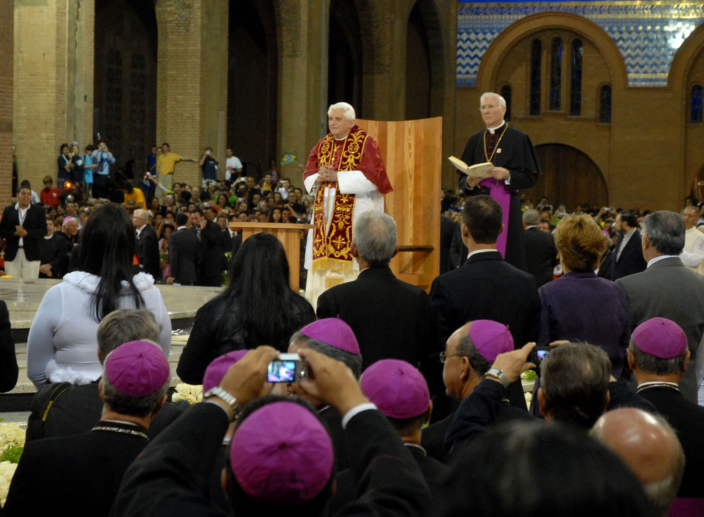 Papa Bento XVI durante cerimônia religiosa na Basílica de Nossa Senhora Aparecida, no interior do estado de São Paulo, Brasil.